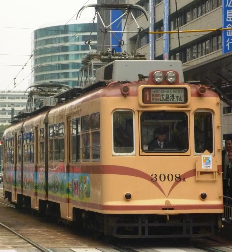 広電3008号